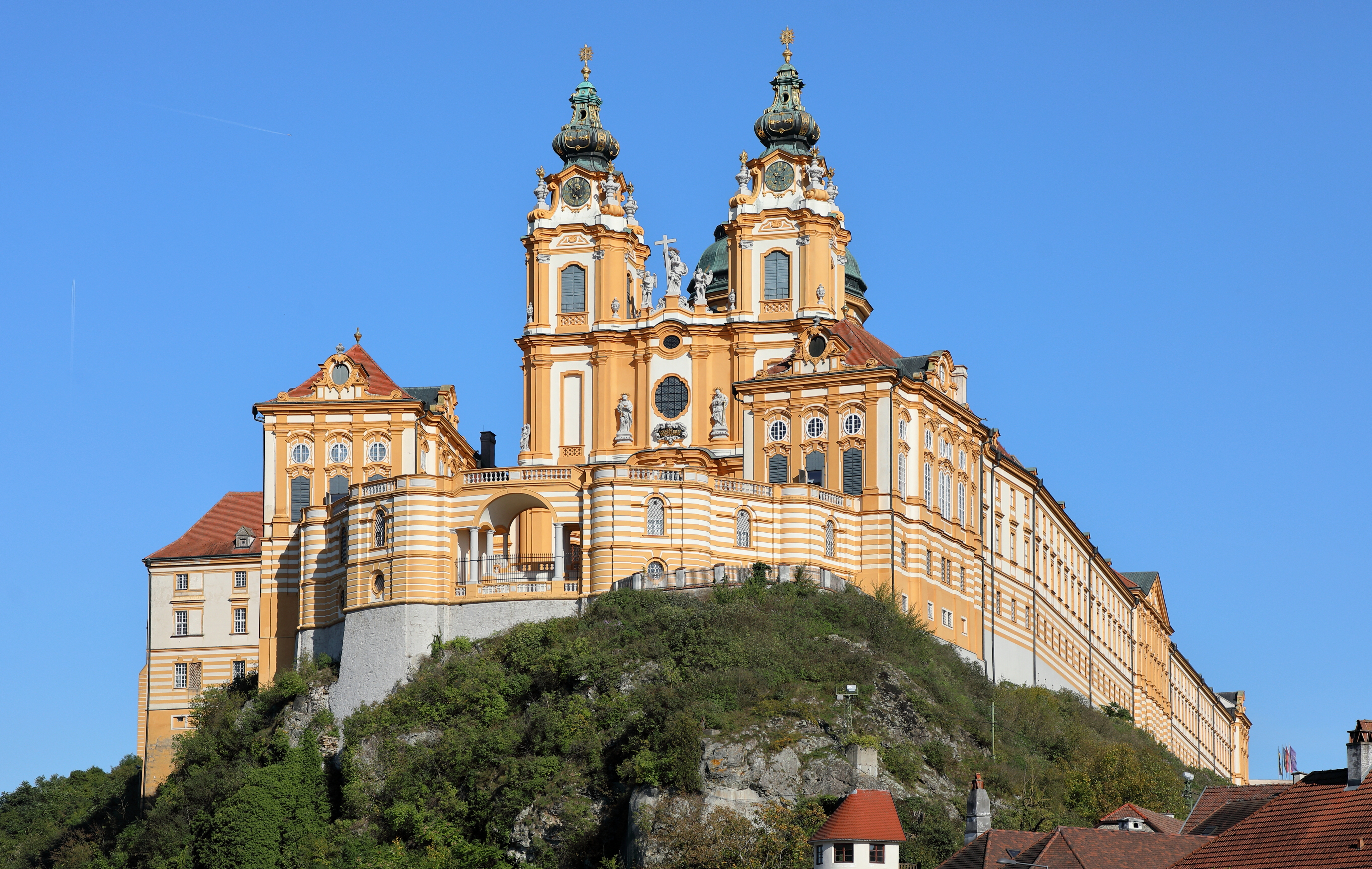 Westsüdwestansicht des 1089 gegründeten Benediktinerstiftes in der niederösterreichischen Stadtgemeinde Melk. Die Stiftsanlage wurde in der 1. Hälfte des 18. Jahrhundert grundlegend umgebaut sowie erweitert und erhielt dabei im Wesentlichen ihr heutiges Erscheinungsbild.